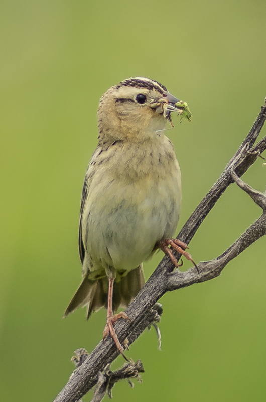 Burnidge FP Elgin, IL